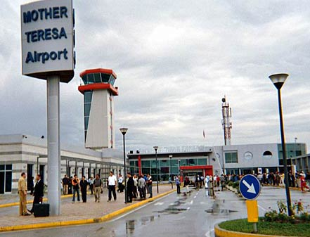 Beschreibung: Das Flughafengebäude des Mother Teresa Airport in Tirana, Albanien. Quelle: selber fotografiert im September 2004. Fotograf: Lars Haefner Lizenzstatus: GNU FDL